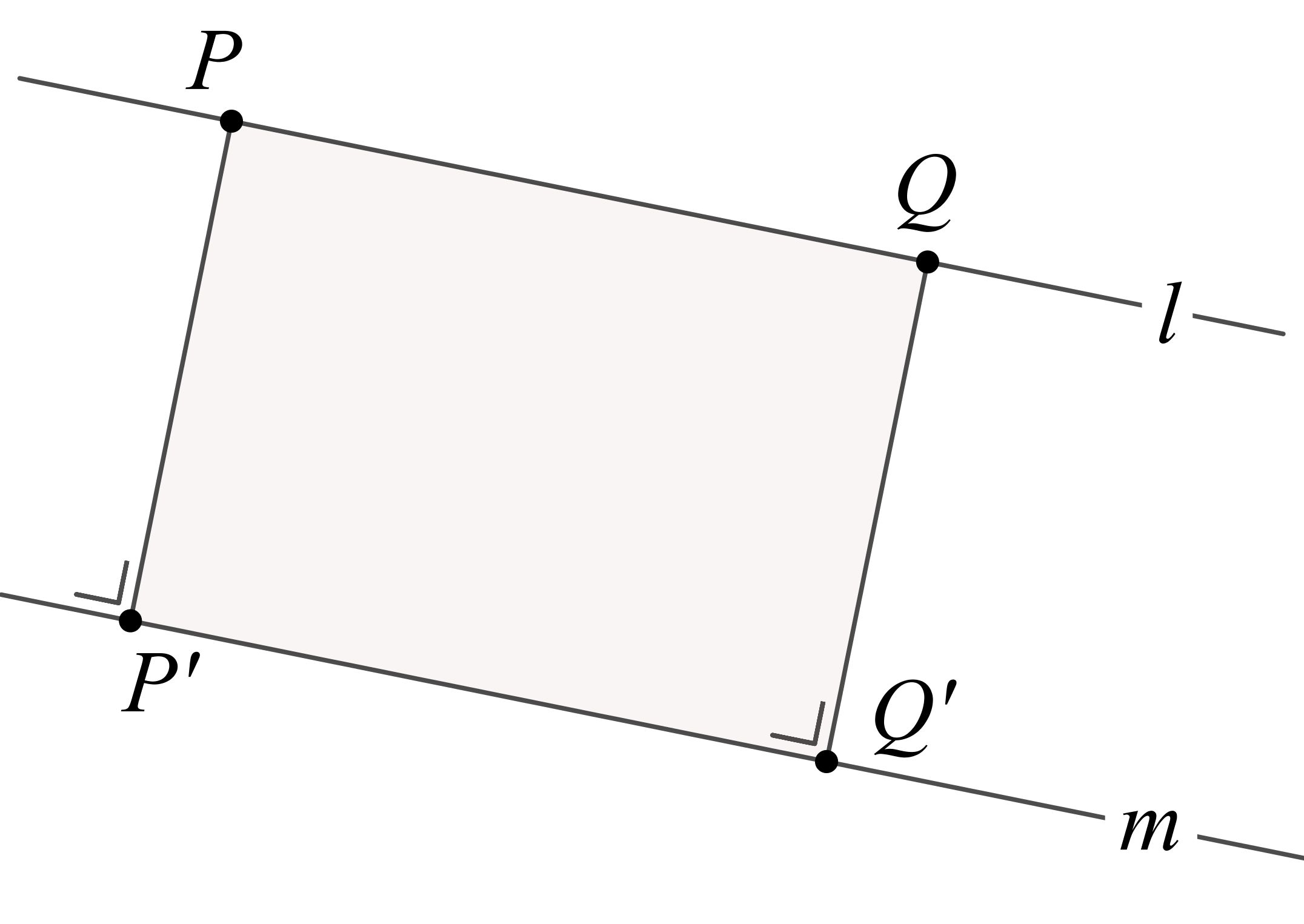 Afstand tussen evenwijdige lijnen